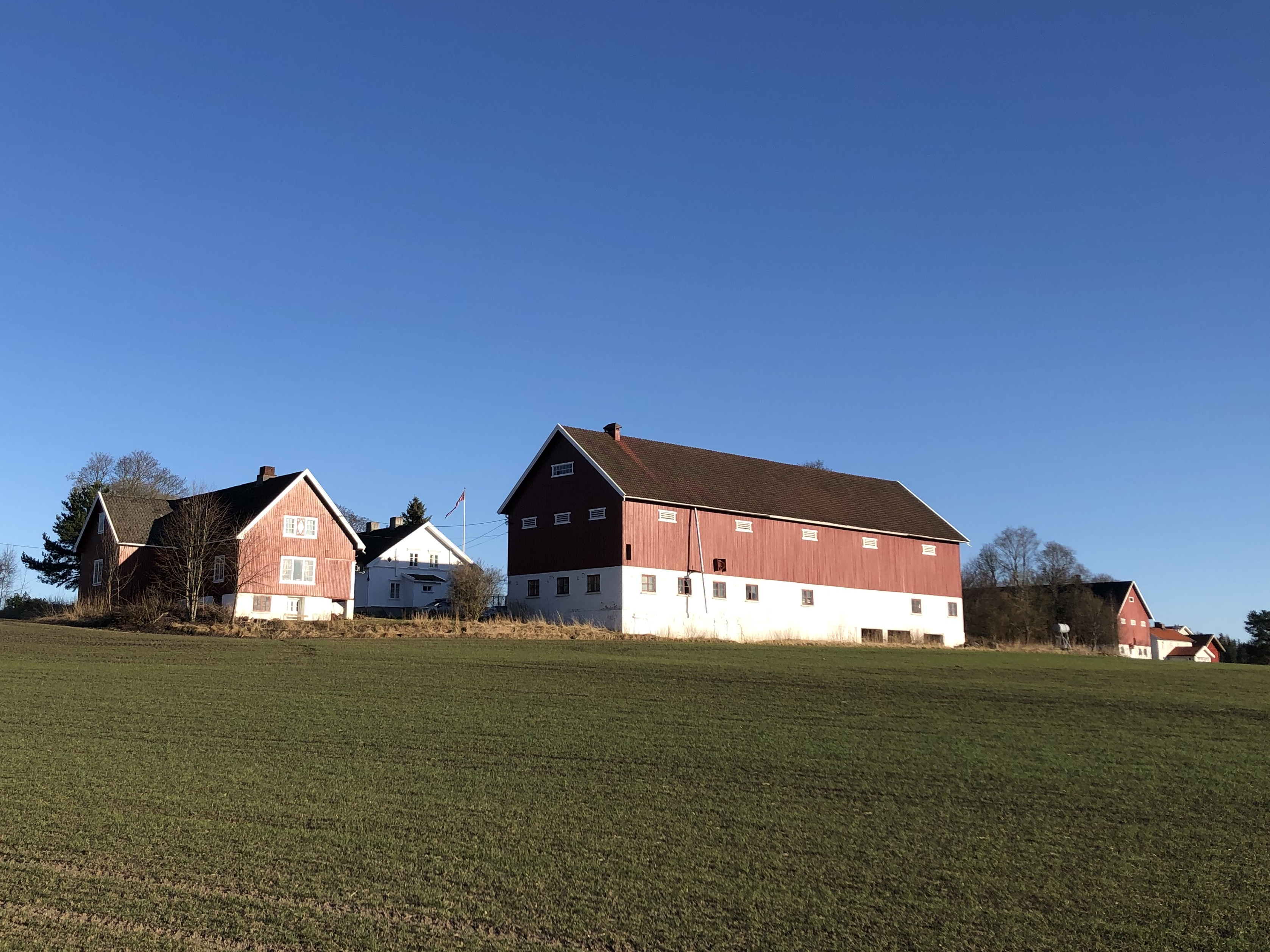 Sætrang gård, Sætrangsgata 1 og 3, Ringerike